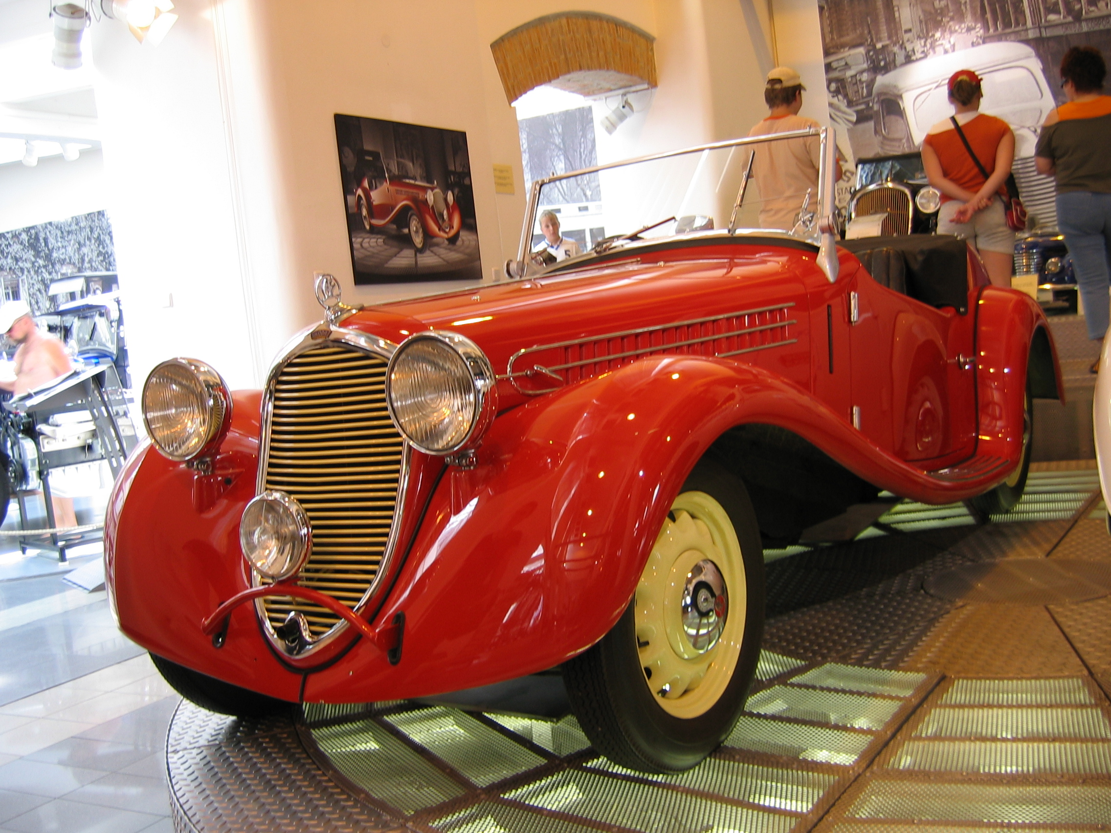 1937 Škoda Rapid - Škoda Auto Museum, Mlada Boleslav